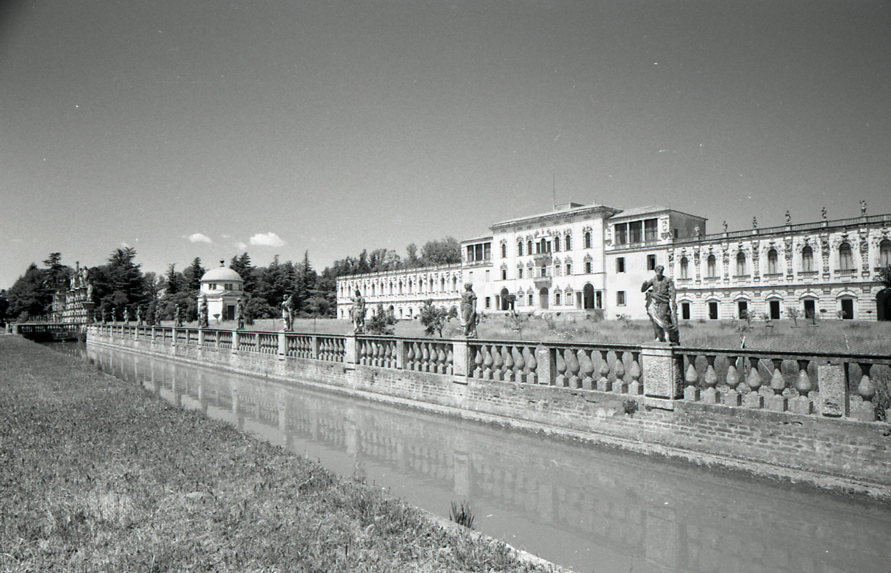 Servizio fotografico : Piazzola sul Brenta, 1967 / Paolo Monti. - Strisce: 7, Fotogrammi complessivi: 38 : Negativo b/n, gelatina bromuro d'argento/ pellicola ; 35 mm. - ((I fotogrammi hanno una doppia numerazione. . - Sul portanegativi: Leica M Agfa ISS. - Occasione: Pubblicazione: Diego VALERI (a cura di), Padova: i secoli, le ore, Bologna, Edizioni Alfa, 1967. - Fonte: Agenda di Paolo Monti: Monti/ 3 aprile 1966 - 9 marzo 1971/ 12421-16823 (1966-1971), presso Archivio Paolo Monti